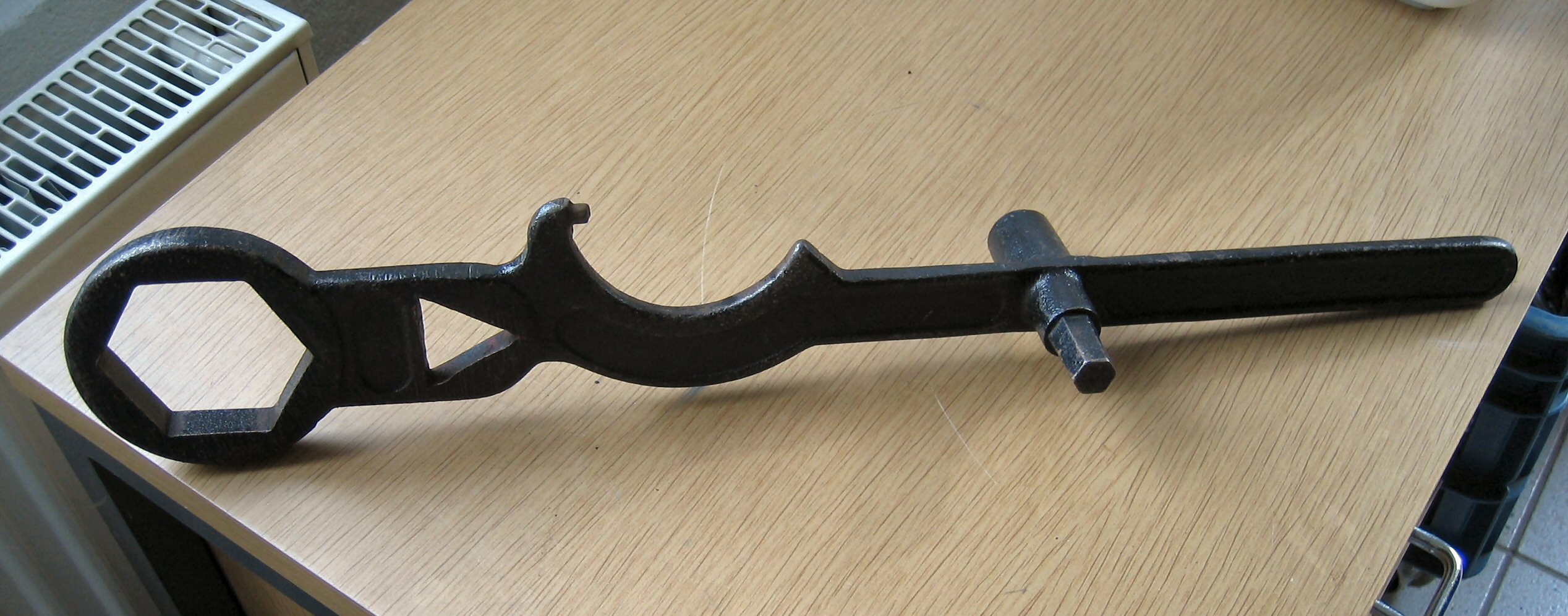 Hydrantenschlüssel für Oberflurhydranten (grosse Ausführung)